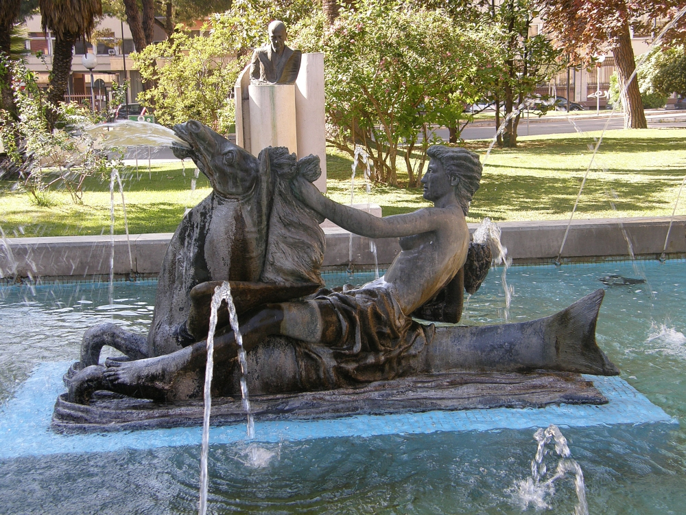 der Brunnen vor der Stadtverwaltung in Pescara